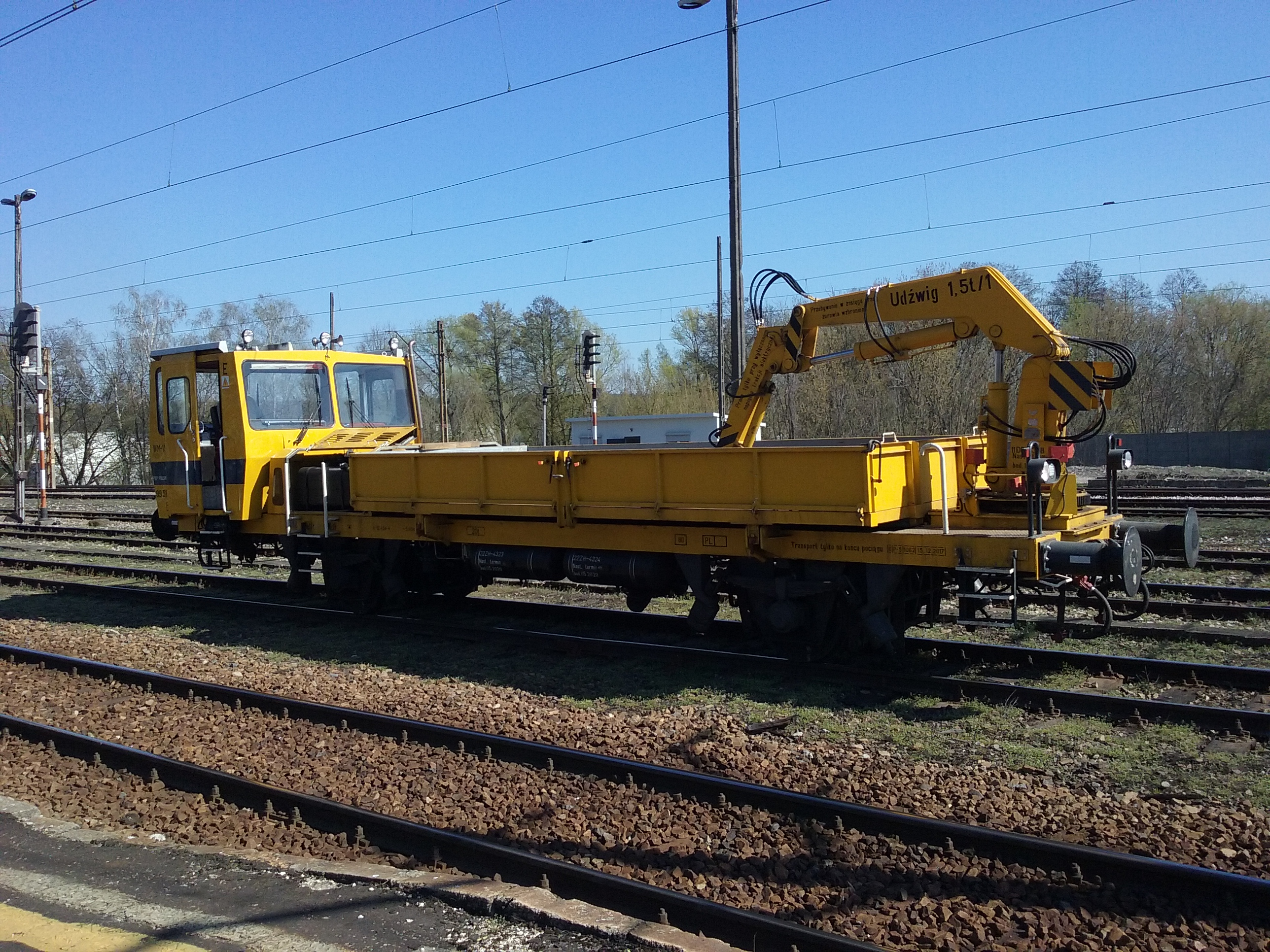 Tomaszów Mazowiecki - dźwig kolejowy na stacji